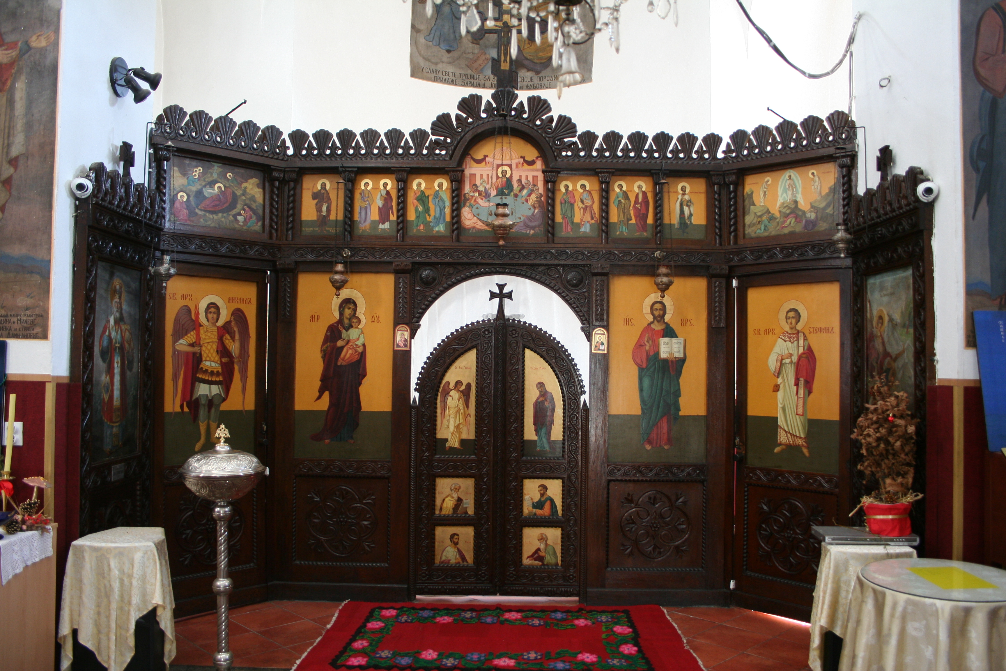 Crkva Preobraženja Gospodnjeg, Ljubovija